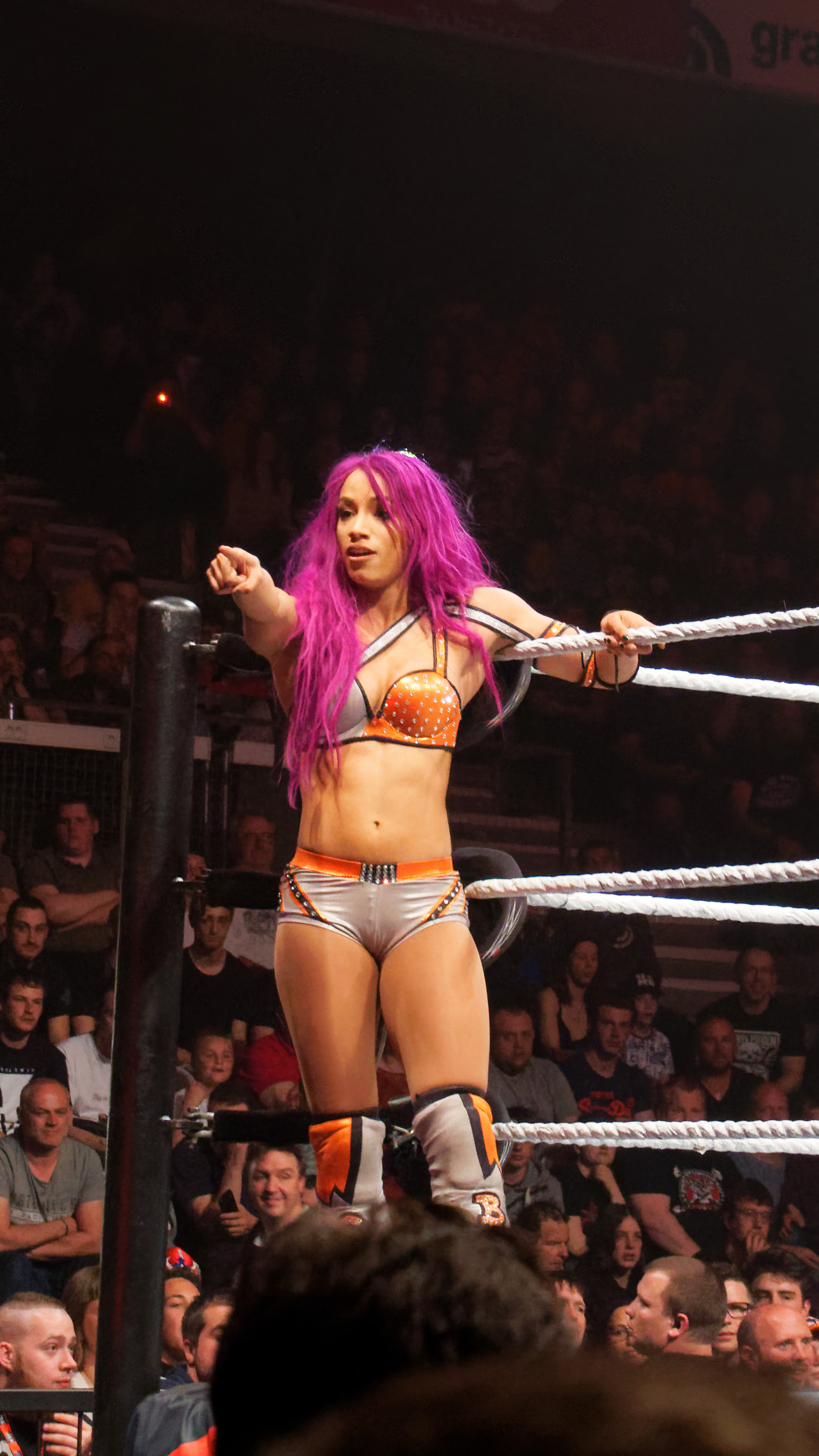 Dana Brooke & Sasha Banks defeat Alicia Fox & Nia Jax ( Le vendredi 12 mai, la WWE Live Tour fera escale au Country Hall a Liege pour le spectacle de catch de l'annee! Au programme: des duels impitoyables et des rencontres captivantes entre les meilleures equipes et les plus grands rivaux. )